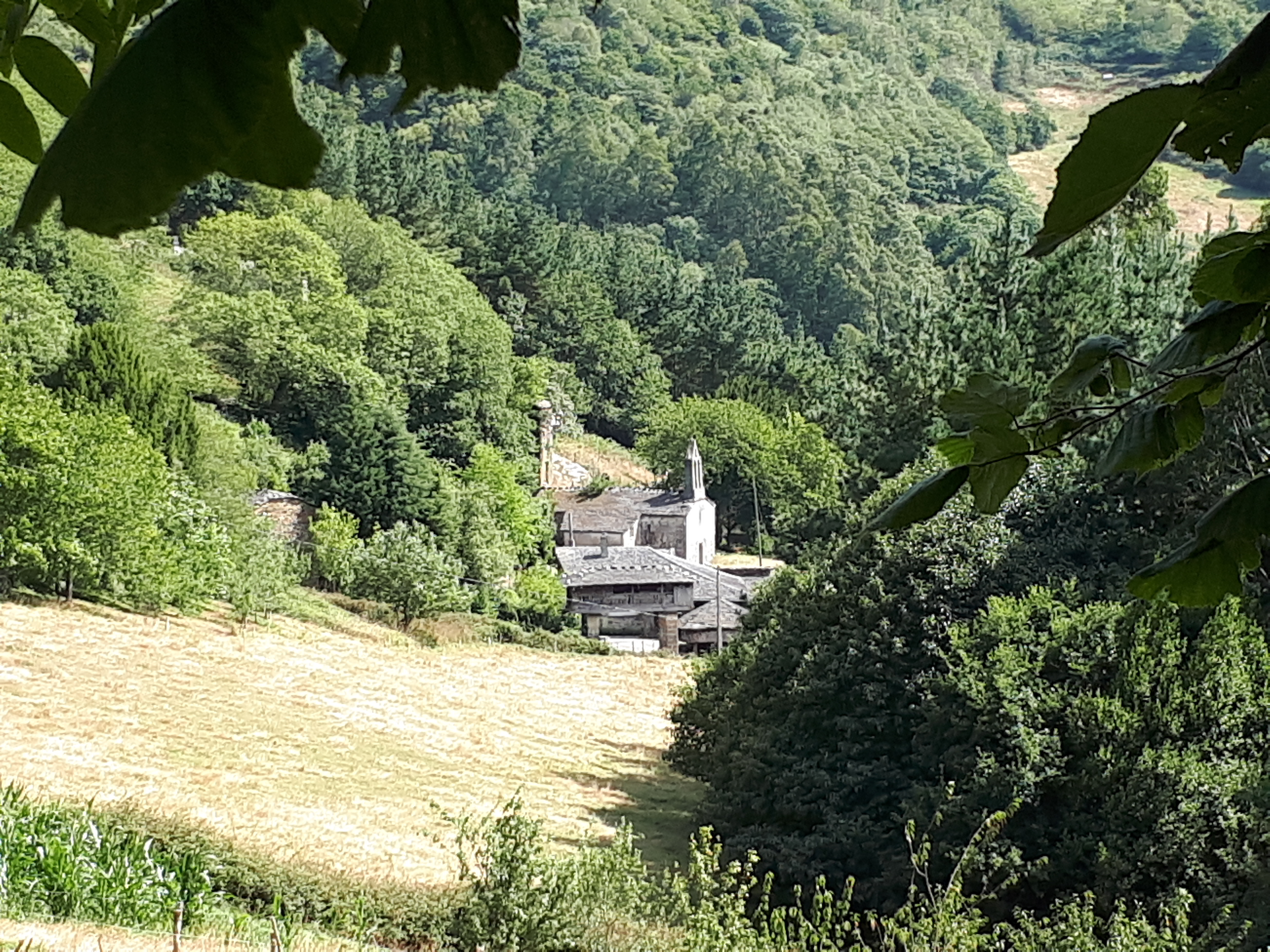 Vista de Santiago de Acevo